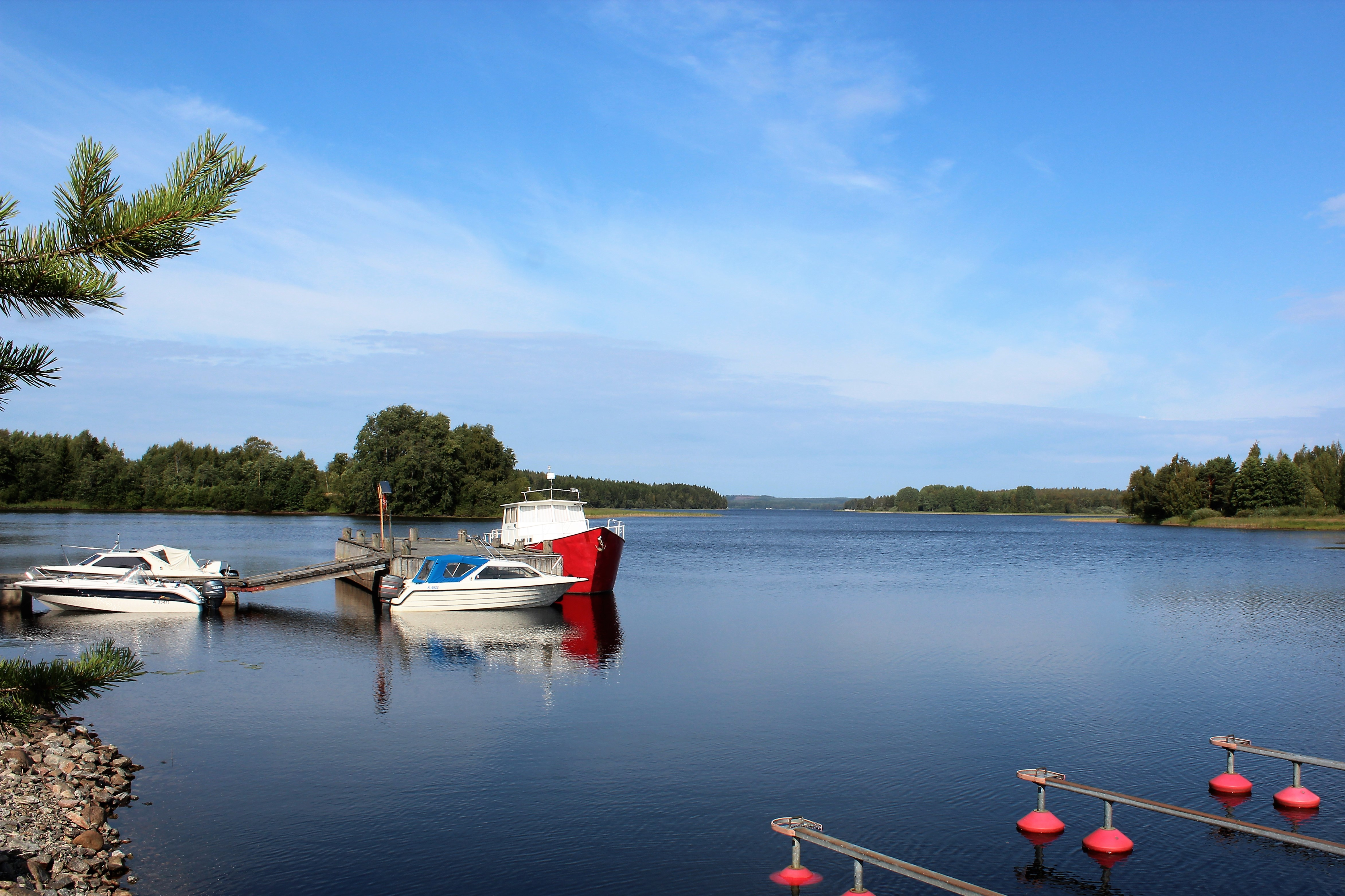 Melalahti kuvattuna Riistaveden satamasta.